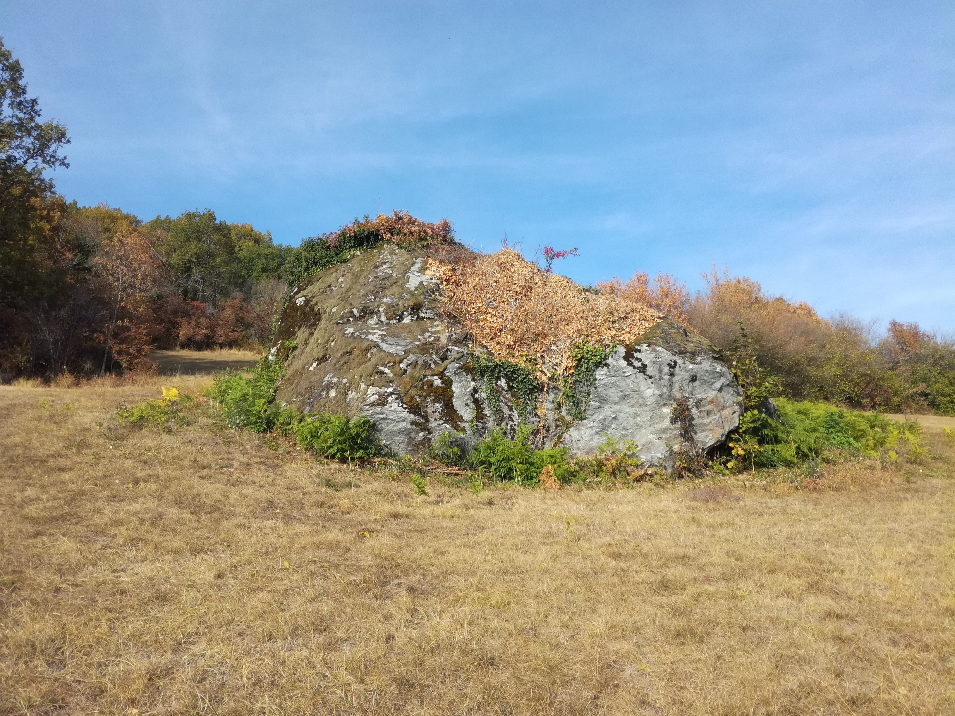 Bloc erratique de Riant Mont situé à Vesancy, Ain, France.